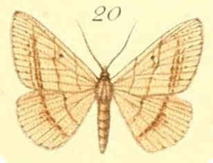 Isturgia catalaunaria (Guenée, 1858) (Semiothisa largificaria)